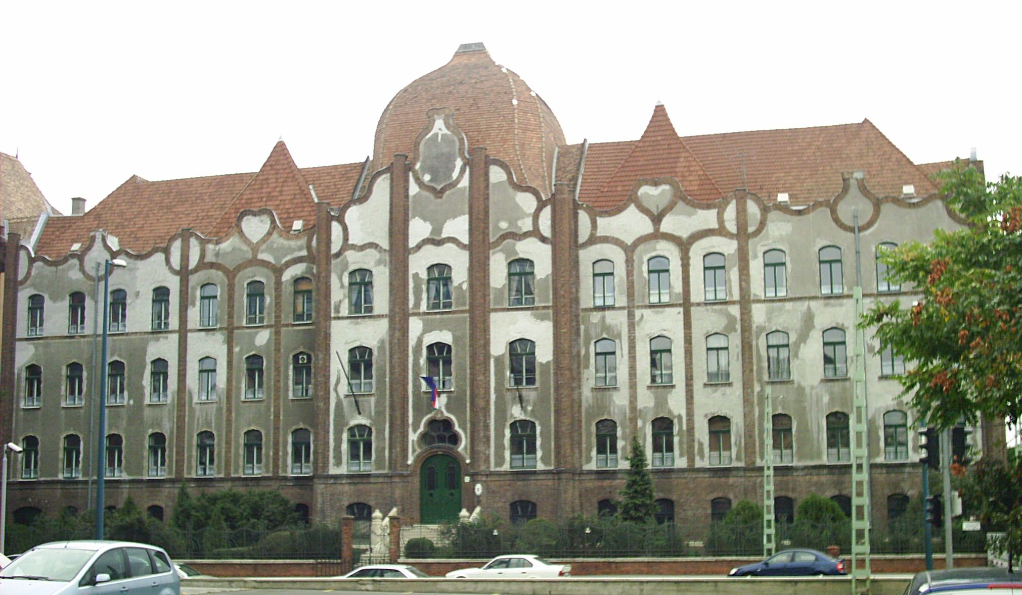 Teleki Blanka Gimnázium, Budapest, Hungária körút környékéről.